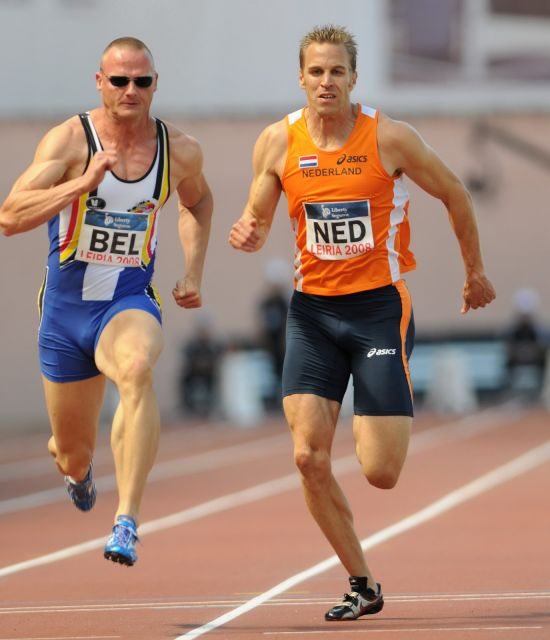 Erik Wijmeersch (links) + Guus Hoogmoed, Europacup 2008